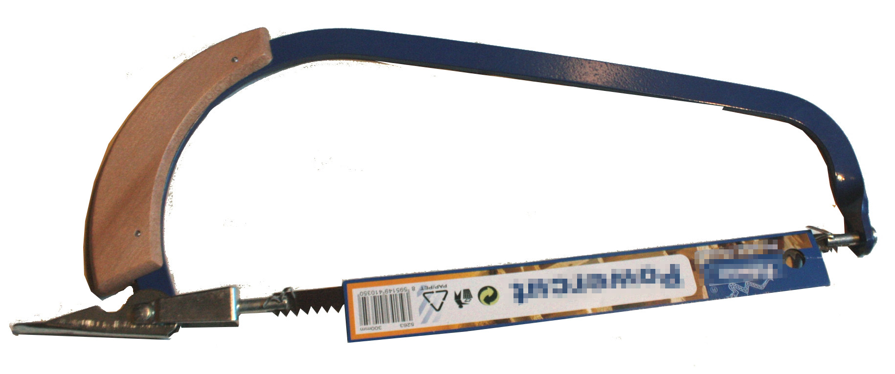 Pila s otočný listem, výrobce Pilana